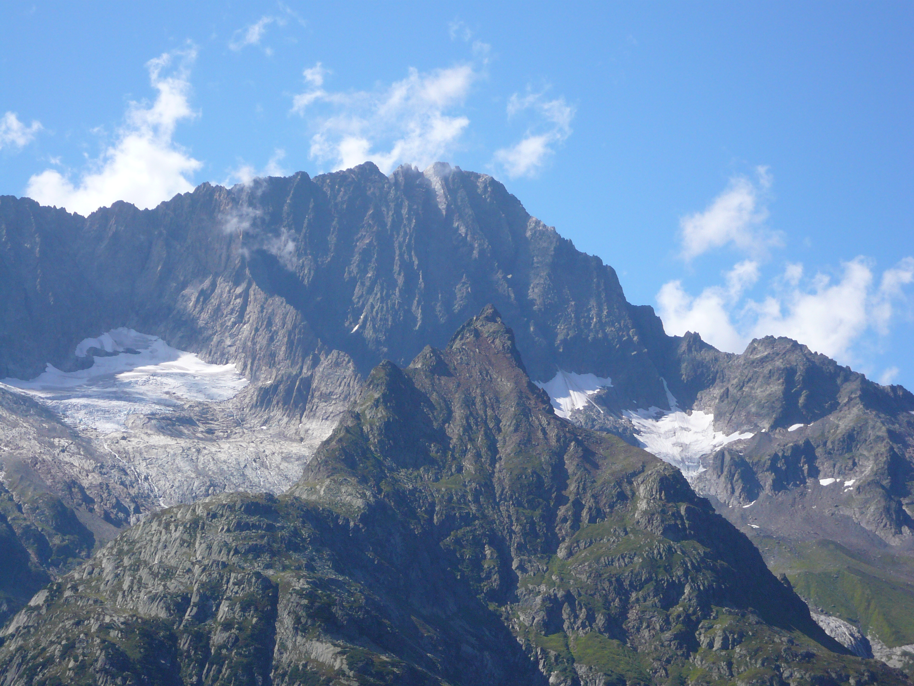 Ritzlihorn 3282m ( am 16.08.2011 vom Gelmersee aus gesehen 1849m (